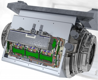 Antrieb